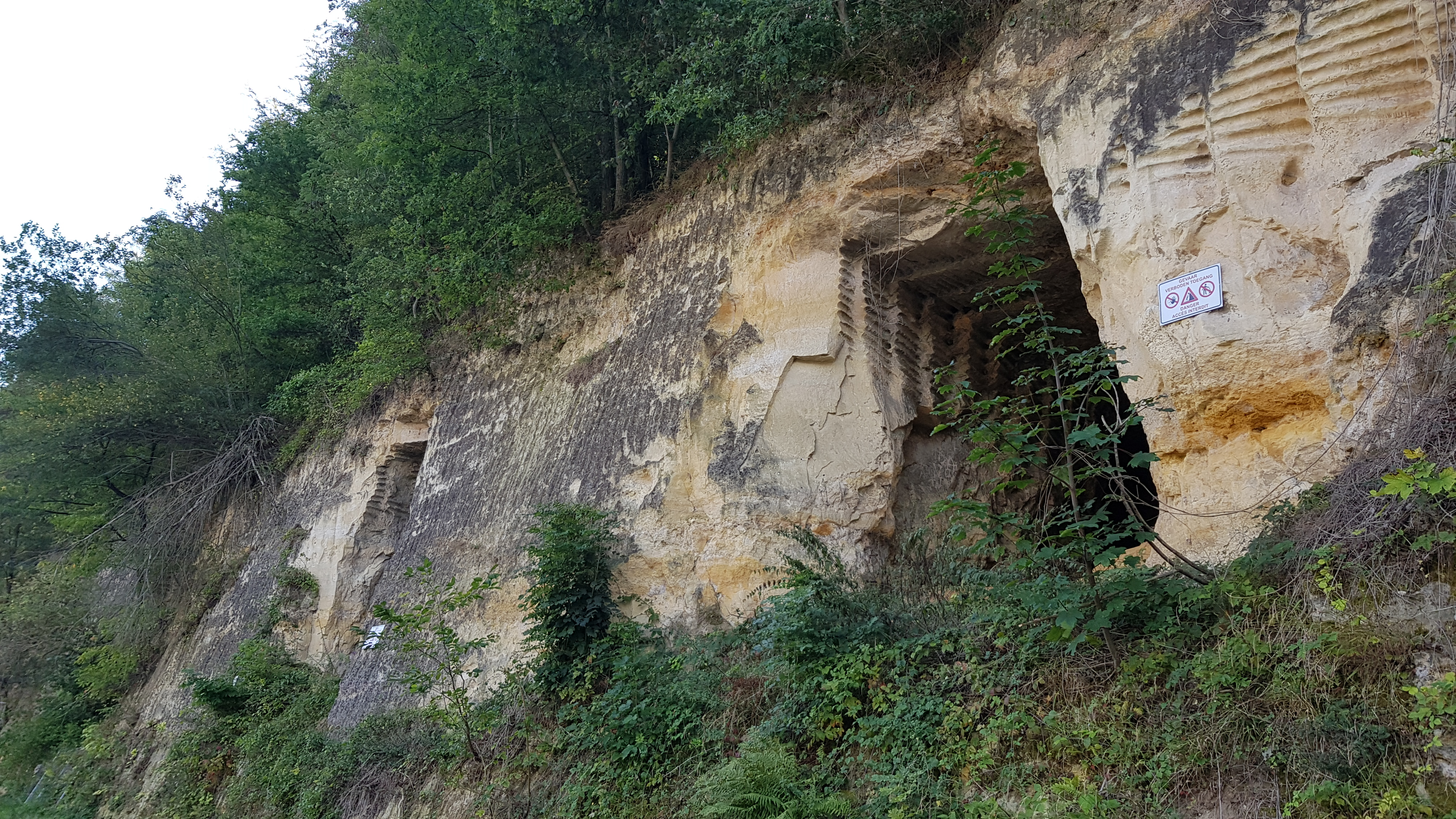 Groeve Mathus, Kanne, België